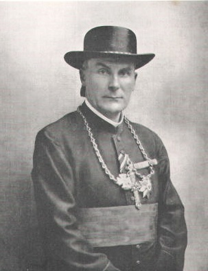 Erzbischof Michael von Faulhaber als Bayerischer Feldpropst